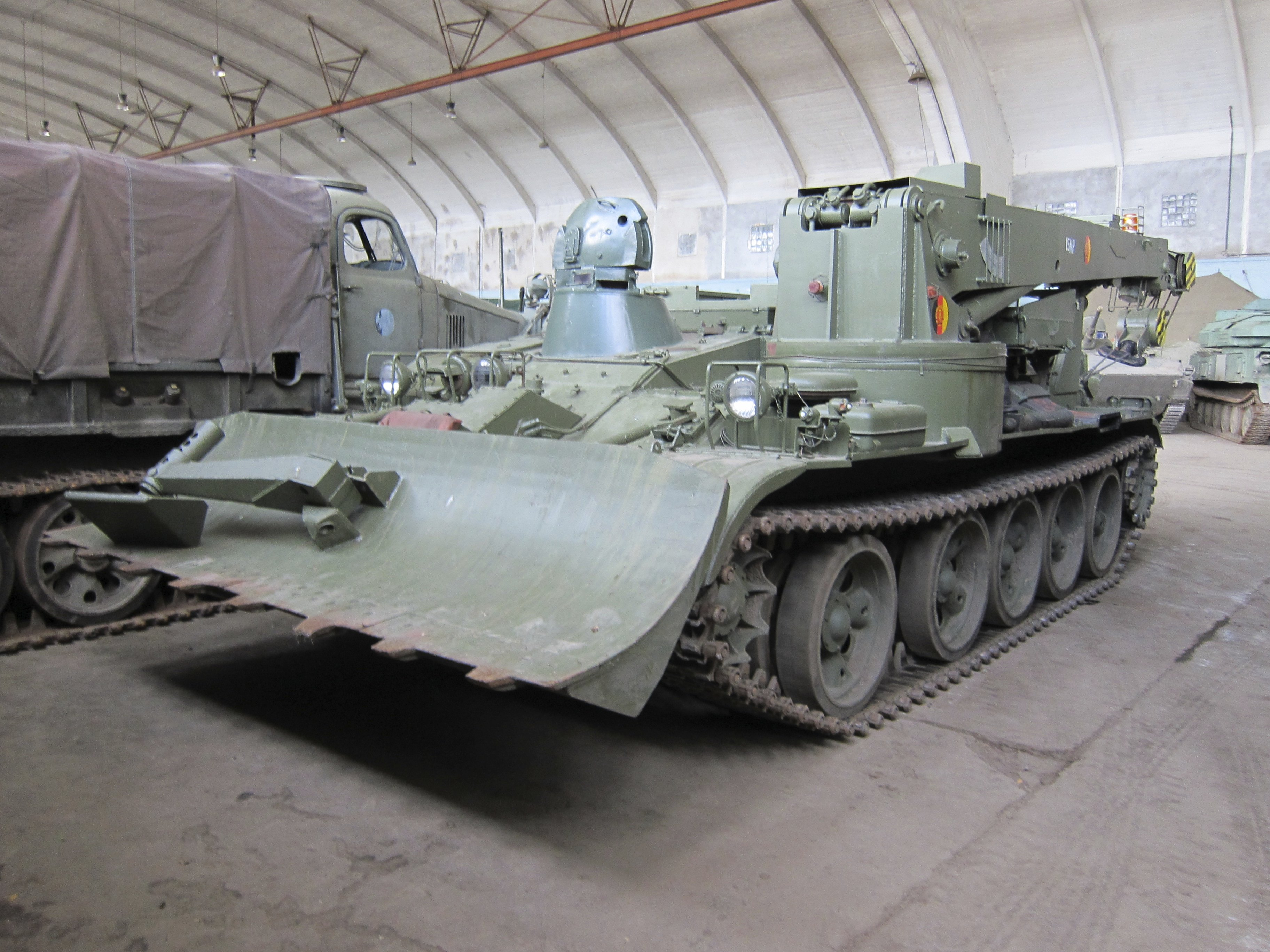 Technik Museum Pütnitz